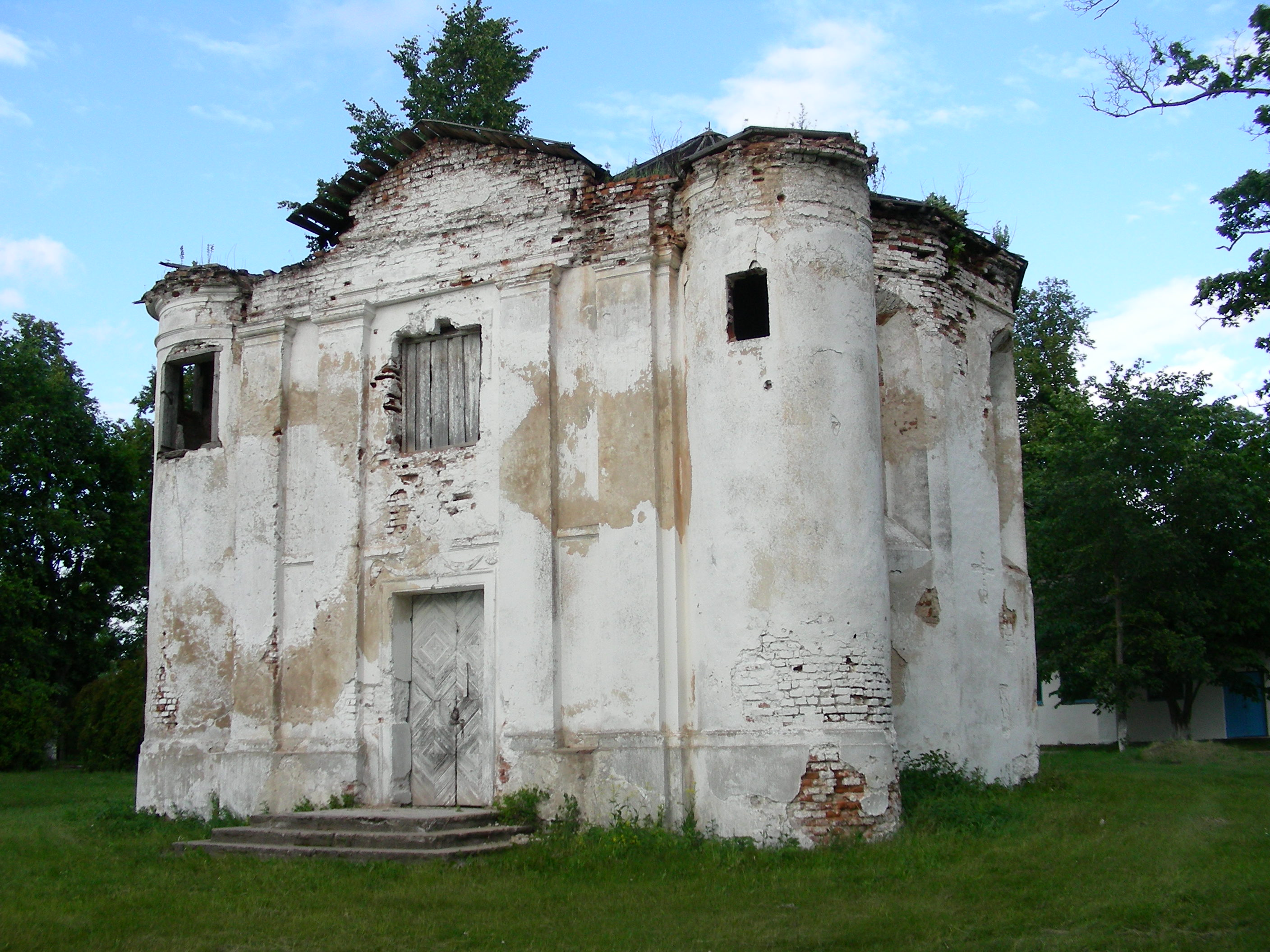 Беларуская (тарашкевіца): Фрагмэнты былой сядзібы «Кухцічы»: кальвінскі збор, парк, афіцына, гаспадарчыя пабудовы, стайня, млын. пас. Першамайск This is a photo of Belarusian heritage monument. Reference number: 612Г000628 ( WLM)